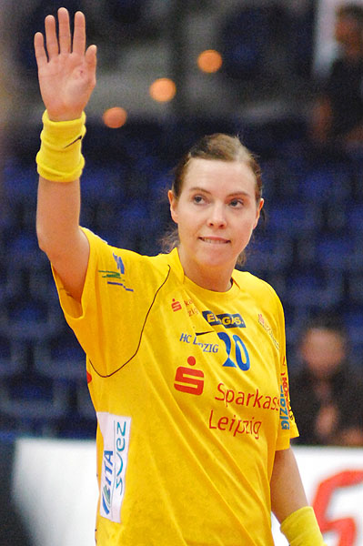 Portrait Else-Marthe Sørlie Lybekk